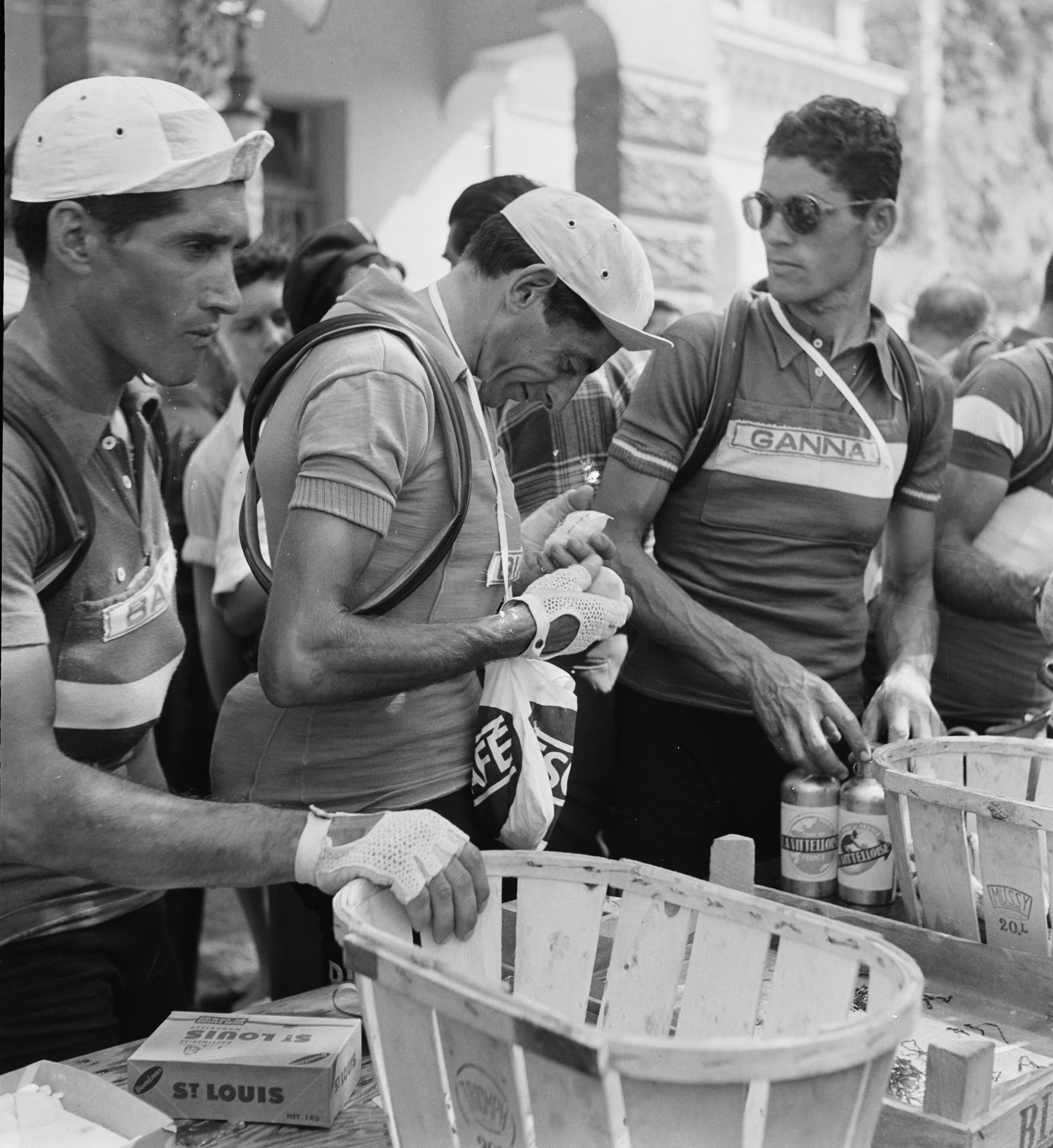 Nationaal Archief Beschrijving: Fausto Coppi eet een sinaasappel Datum: 18 juli 1952 Bestanddeelnummer 905-2267 Vervaardiger: Anefo/ Presser URL: Voor meer informatie over het Nationaal Archief: Voor meer foto's uit deze en andere collecties, bezoek onze Beeldbank:, U kunt ons helpen onze kennis van de fotocollecties te verrijken door tags en commentaren toe te voegen. Herkent u mensen of locaties of heeft u een bijzonder verhaal te vertellen bij één van de foto's, laat dan een reactie achter (als u ingelogd bent bij Flickr) of stuur een mailtje naar